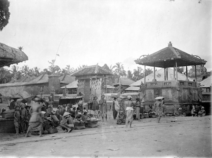 Negatief. Markt bij een puri in Oeboed